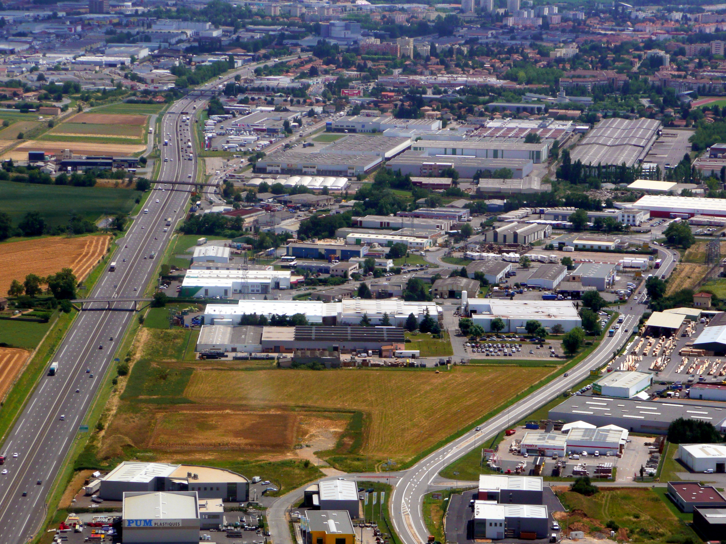 Vue ZI d'Arnas